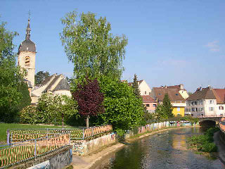 Delle (Territoire de Belfort) La rivière Photo prise par LP90 en mai 2004 Licence GFDL LP90 mai 2004